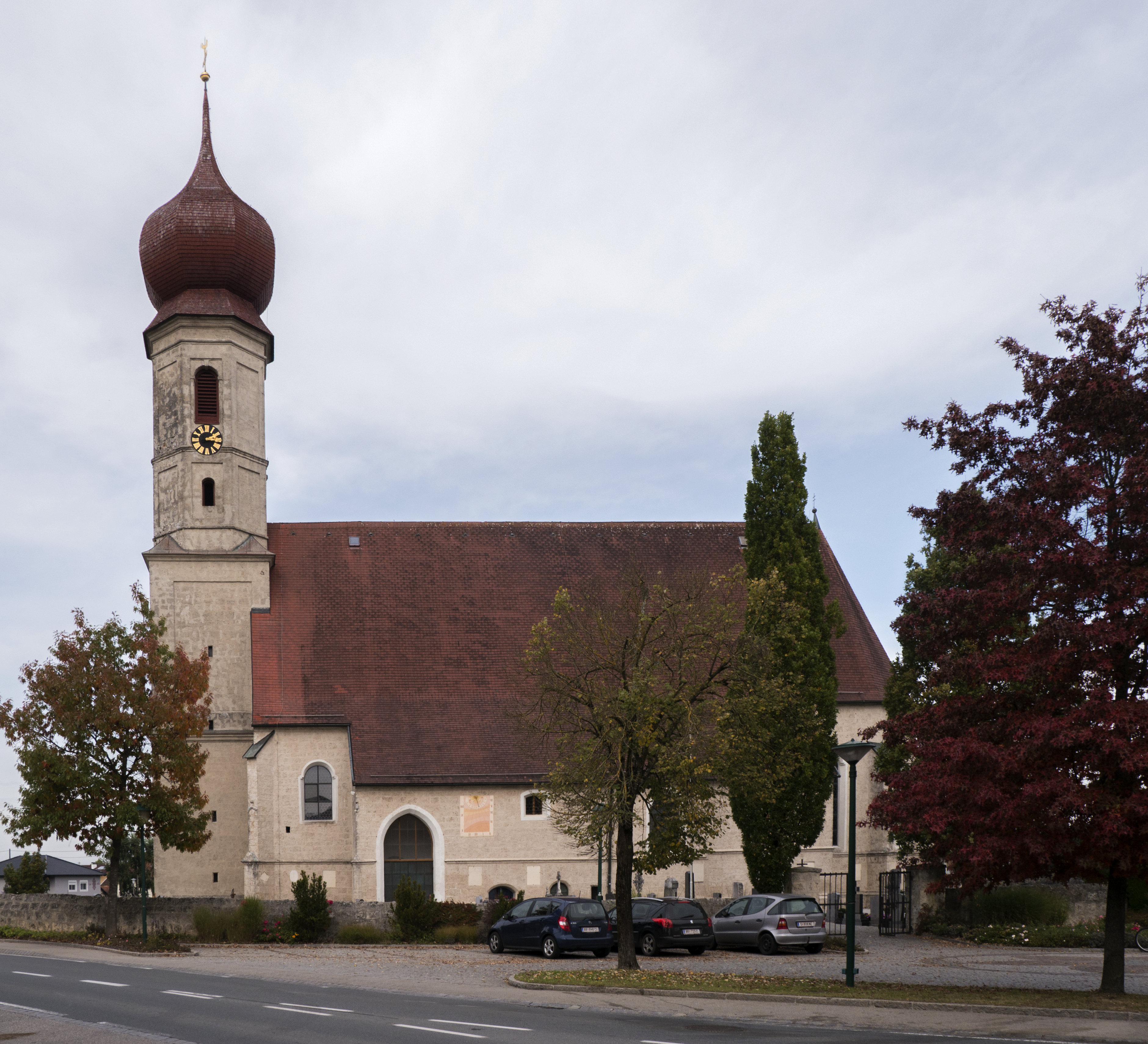 Kath. Pfarrkirche hl. Maximilian und Friedhof mit Ummauerung und Toranlage